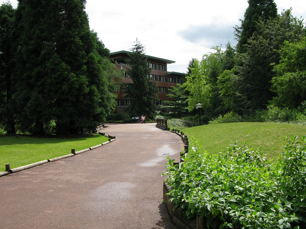 Jardines del hotel Disney's Sequoia Lodge de Disneyland Paris